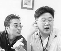 PEN_half size discussion.HF_L_003